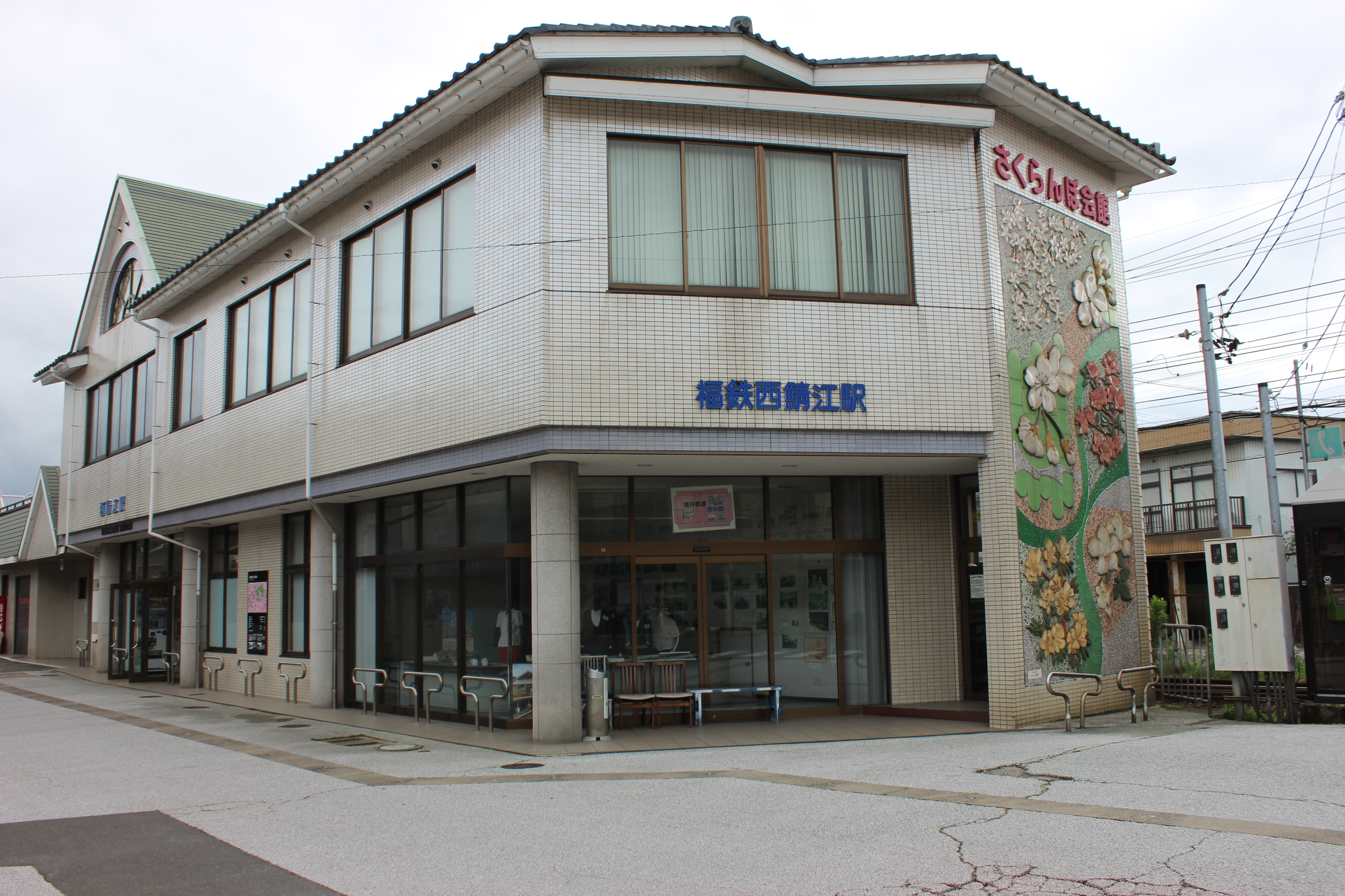 西鯖江駅（福井県鯖江市） Canon EOS Kiss X5